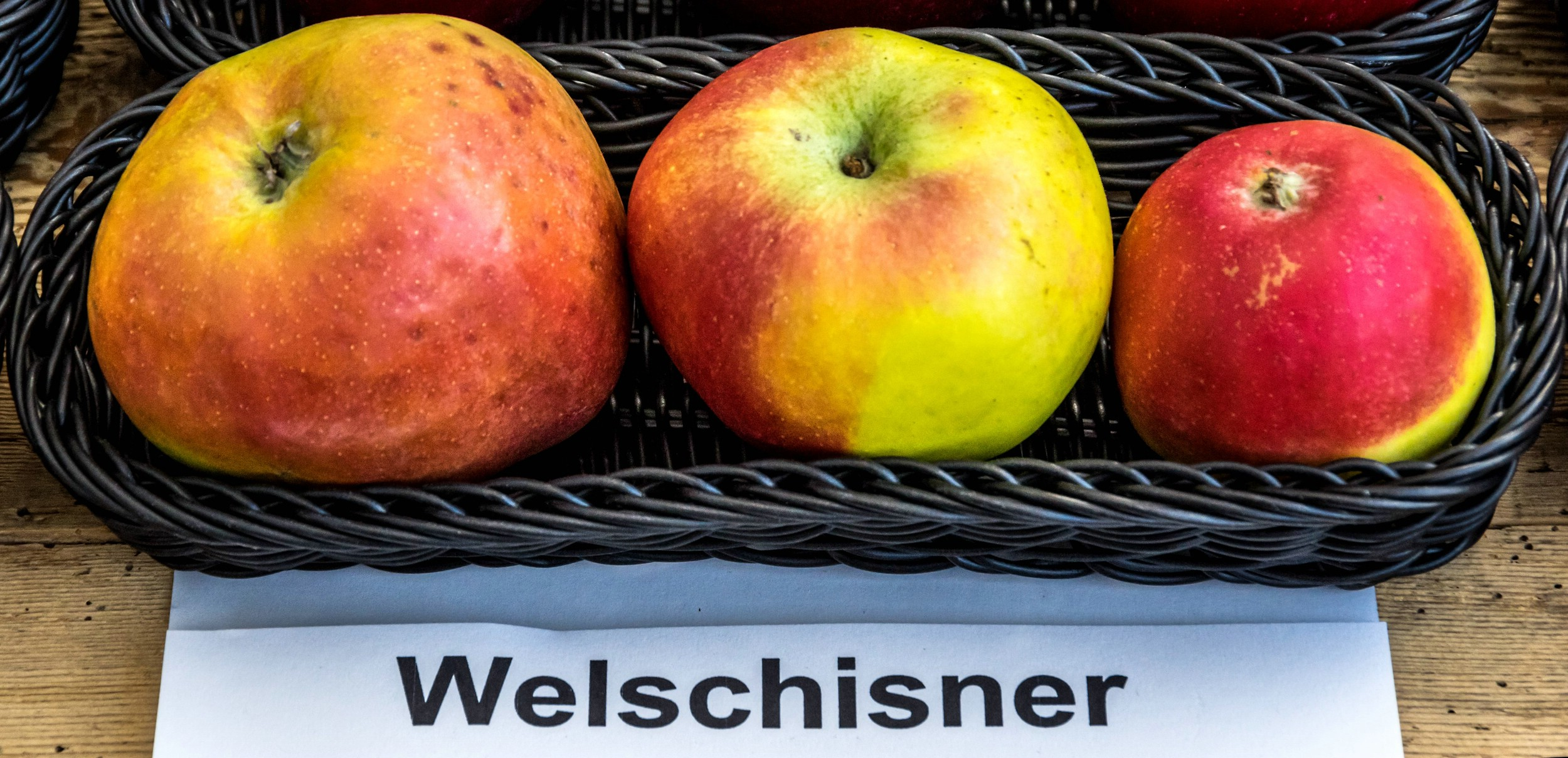 Alte Apfelsorten, von denen es im Badischen noch tragende Bäume gibt. Alle Aufnahmen au dem Oktober 2015